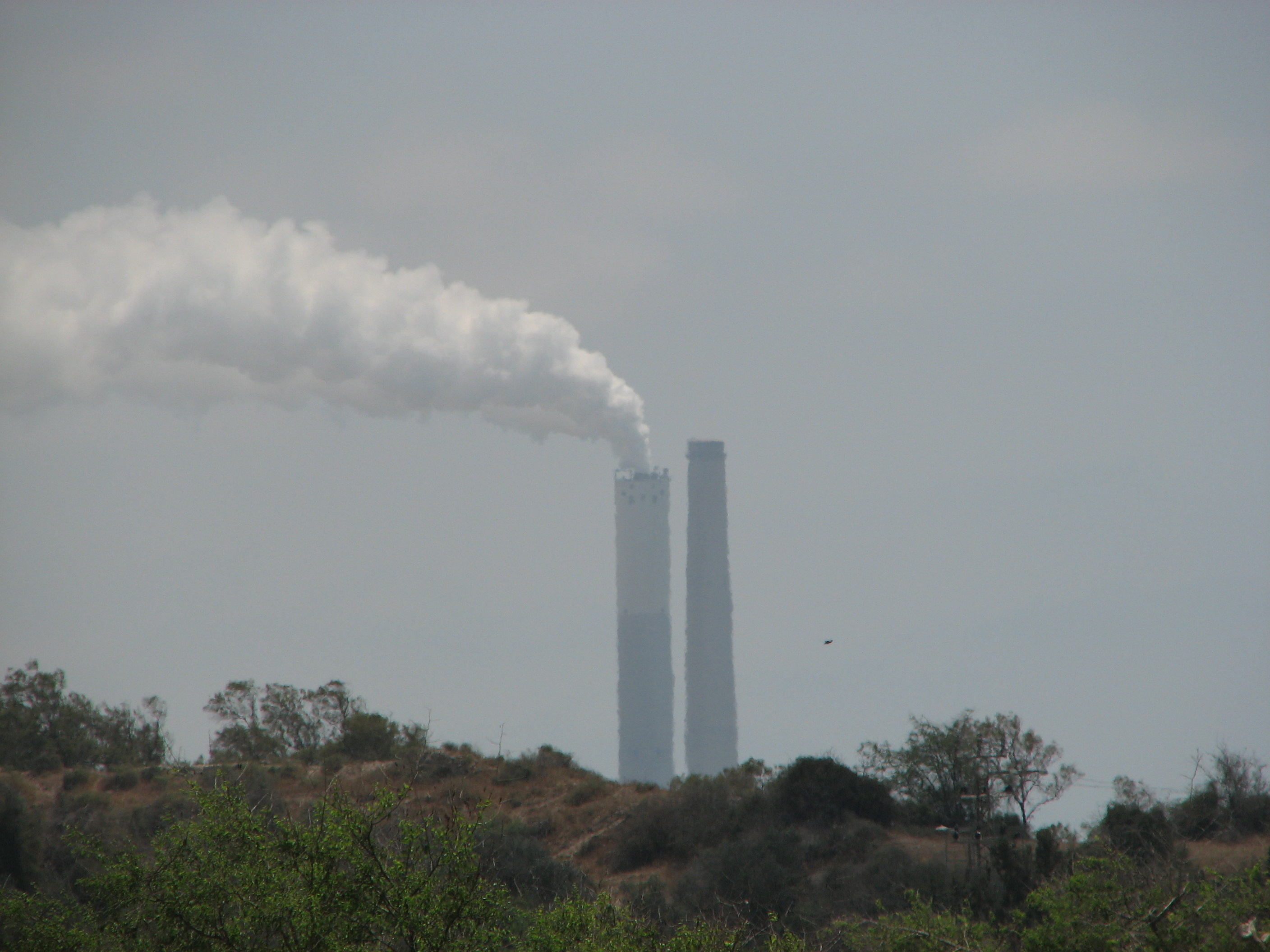 ארובות תחנת הכוח רוטנברג באשקלון.